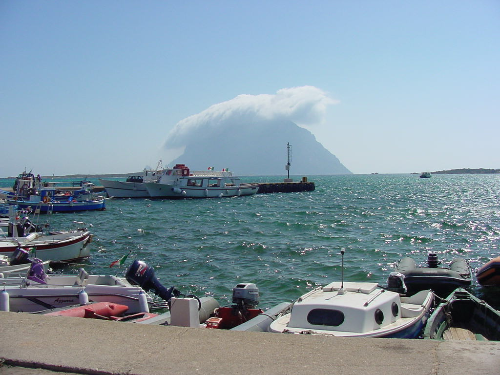 Tavolara vista da Porto San Paolo (Sardegna) nella foto "TAVULARA CO U CAPPIDDU"